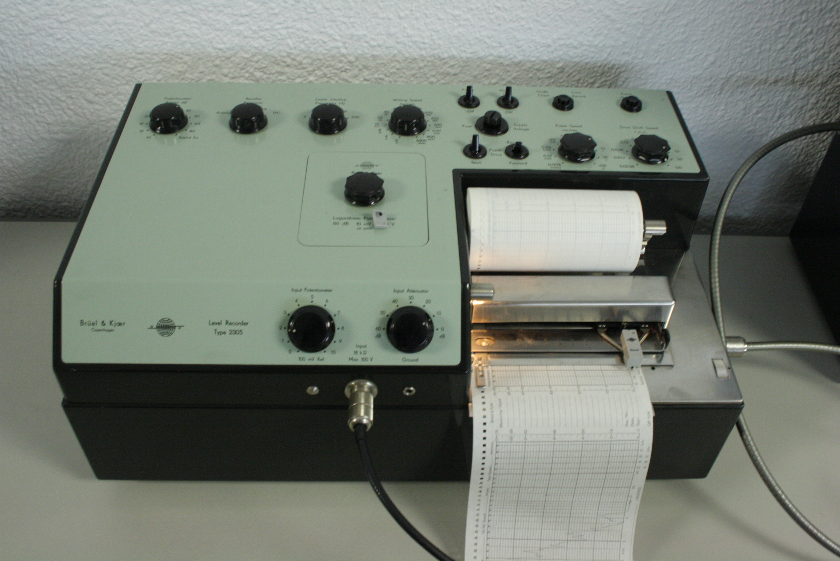 Aparato para la recogida de datos correspondiente al montaje del Tubo de Kundt. Articulo completo: Tubo de Kundt